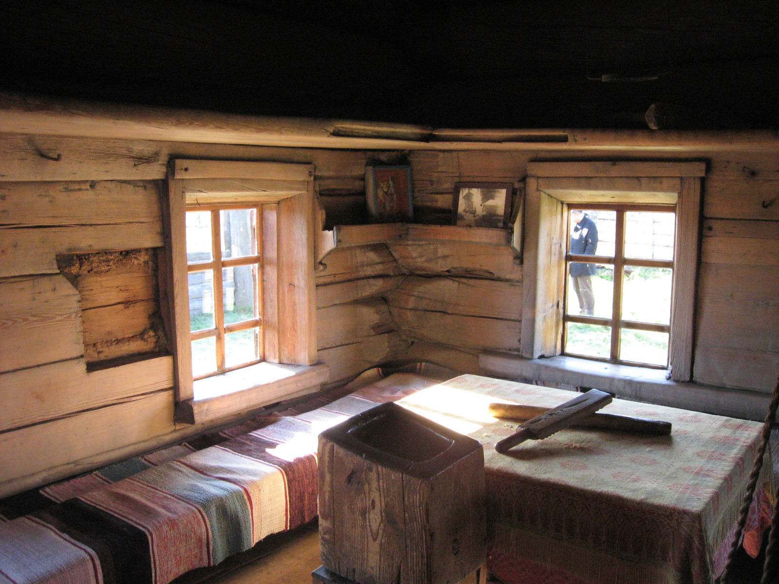 Изба клетская бабы Кати (Свердловская область, Алапаевск, переулок Пушкина, 1)